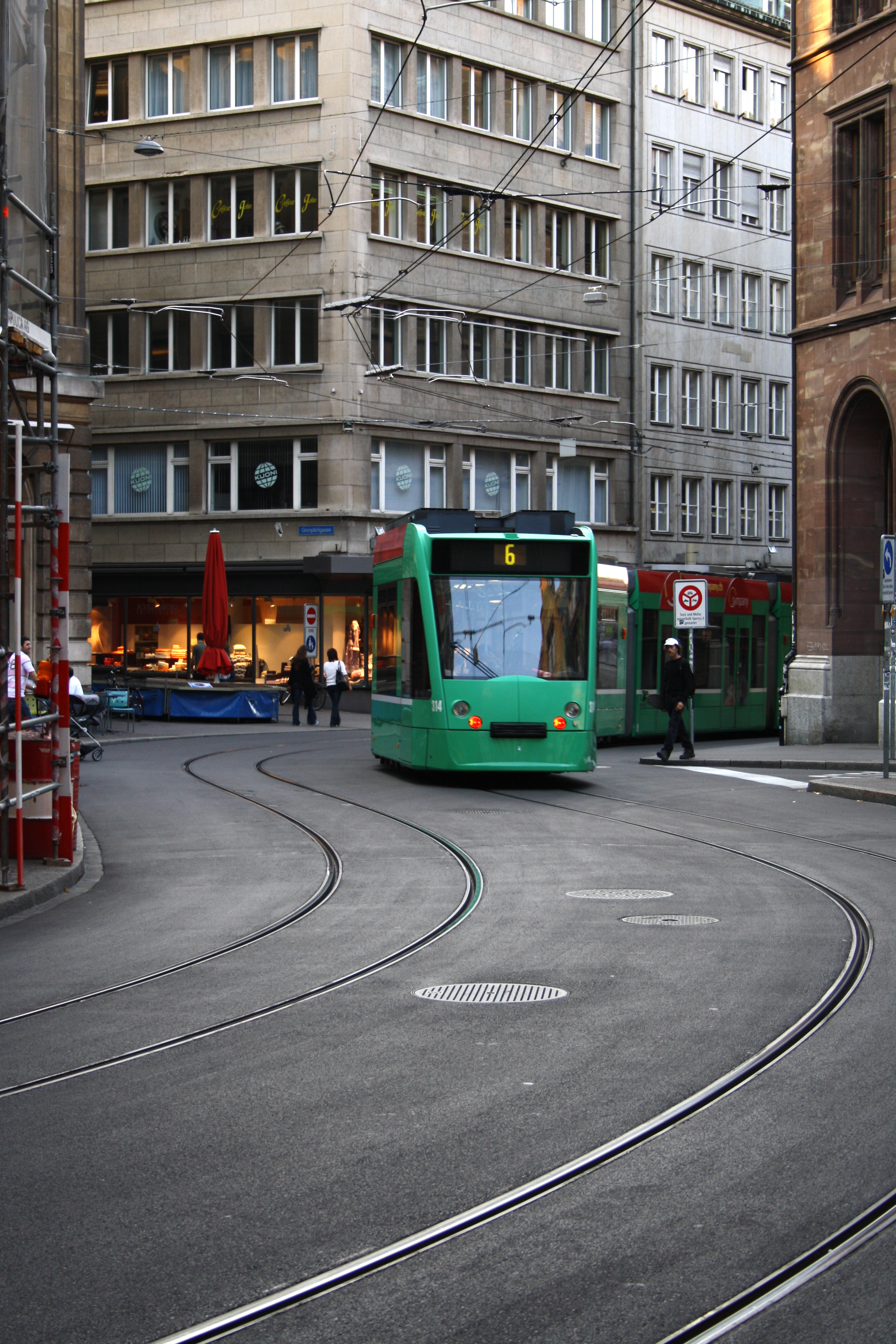 Basel: Tram Linie 6 an der Rüdengasse